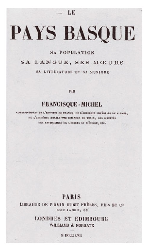 Parisen 1857an argitaratutako Francisque-Michelen Le Pays Basque. Sa population, sa langue, ses moeurs, sa littérature et sa musique lanaren lehen argitalpenaren azala